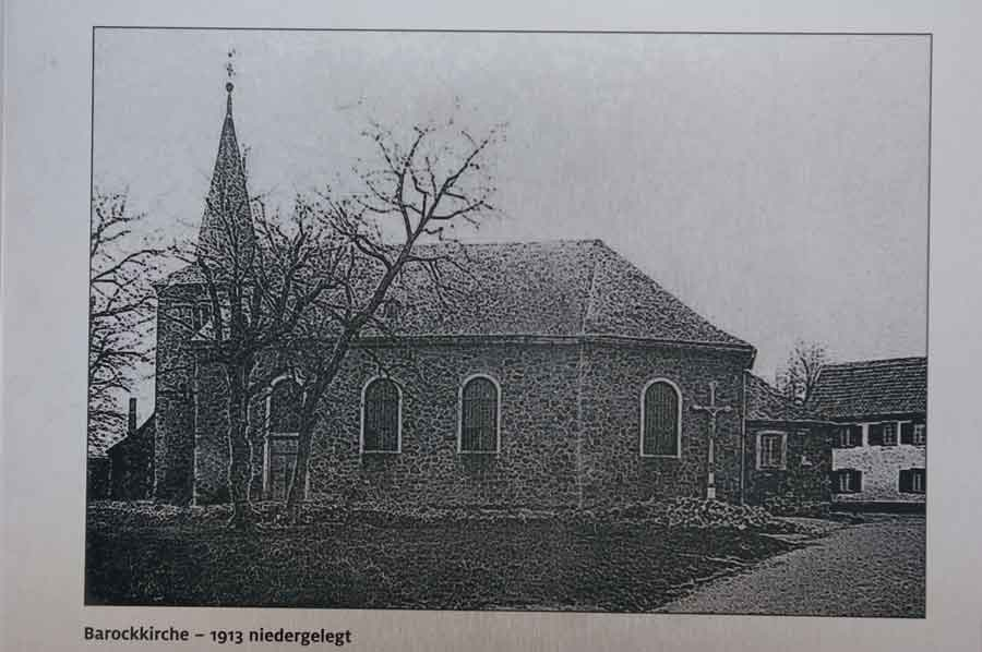 Bild der Barockkirche St. Barbara in Reusrath; Foto vom Schild an der Kirchenwüstung